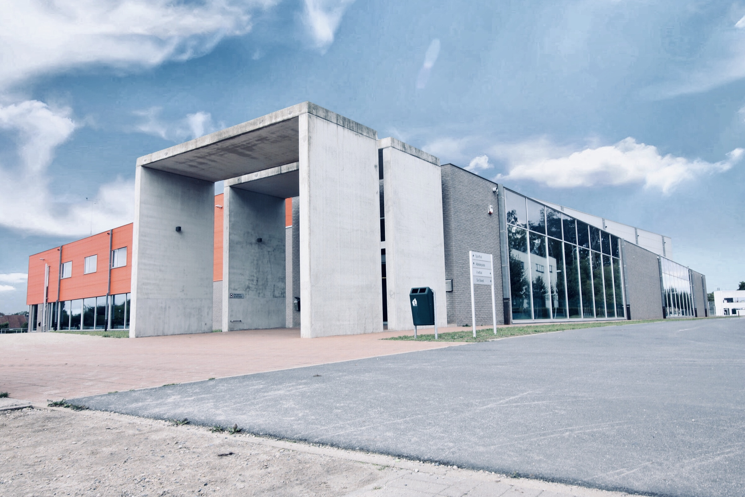 Sporthal Drogenbrood bevindt zich in het sportpark Drogenbrood te Beernem. Deze foto is genomen op 12/09/2019.